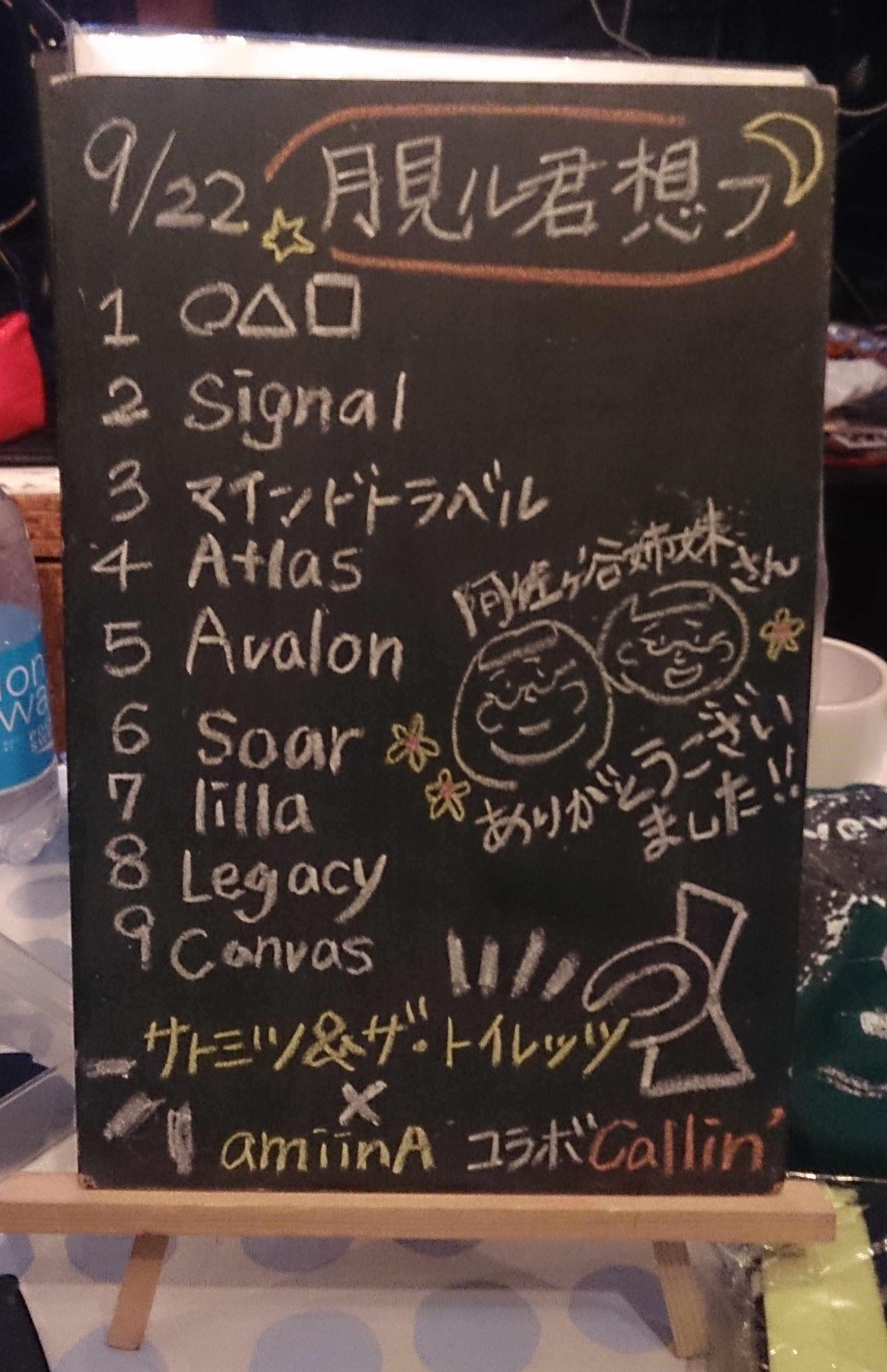 amiinAセトリボード(20170922(1))